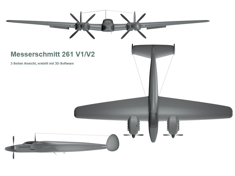 Bildbeschreibung: Messerschmitt 261 V1/V2 Quelle: Fotograf/Zeichner: Clemens Rainer Pohl Datum: 26.03.2006 Sonstiges: Absolut von mir zur Nutzung freigegeben, ohne Lizenzbedingungen